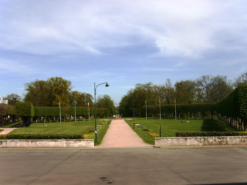 Parc François Mitterrand de Dourdan (91)